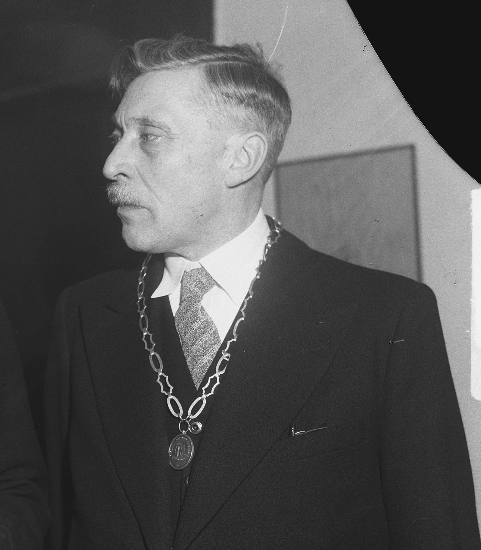 Collectie / Archief : Fotocollectie Anefo Reportage / Serie : [ onbekend ] Beschrijving : Herdenking W. de With in Den Briel door Minister Schokking. Minister Schokking met burgemeeester Van Sleen Datum : 29 maart 1949 Locatie : Brielle, Sleen Trefwoorden : HERDENKING, ministers Persoonsnaam : Schokking, Wim, With, W. de Fotograaf : Merk, Ben / Anefo Auteursrechthebbende : Nationaal Archief Materiaalsoort : Glasnegatief Nummer archiefinventaris : bekijk toegang 2.24.01.09 Bestanddeelnummer : 903-2886